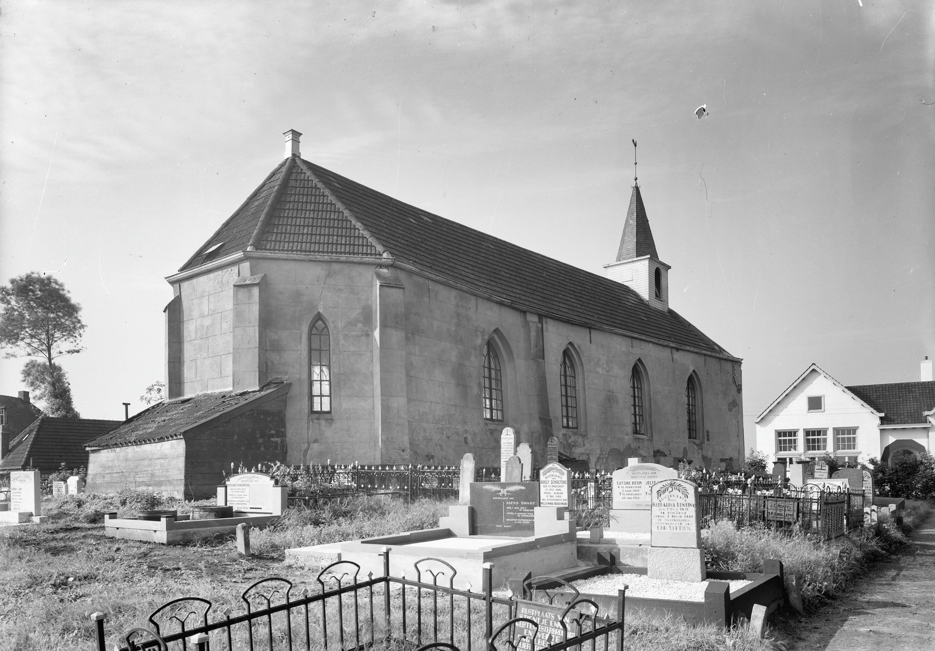 Kerk van Engelbert, gem. Groningen, exterieur vanuit het noordoosten, 1942